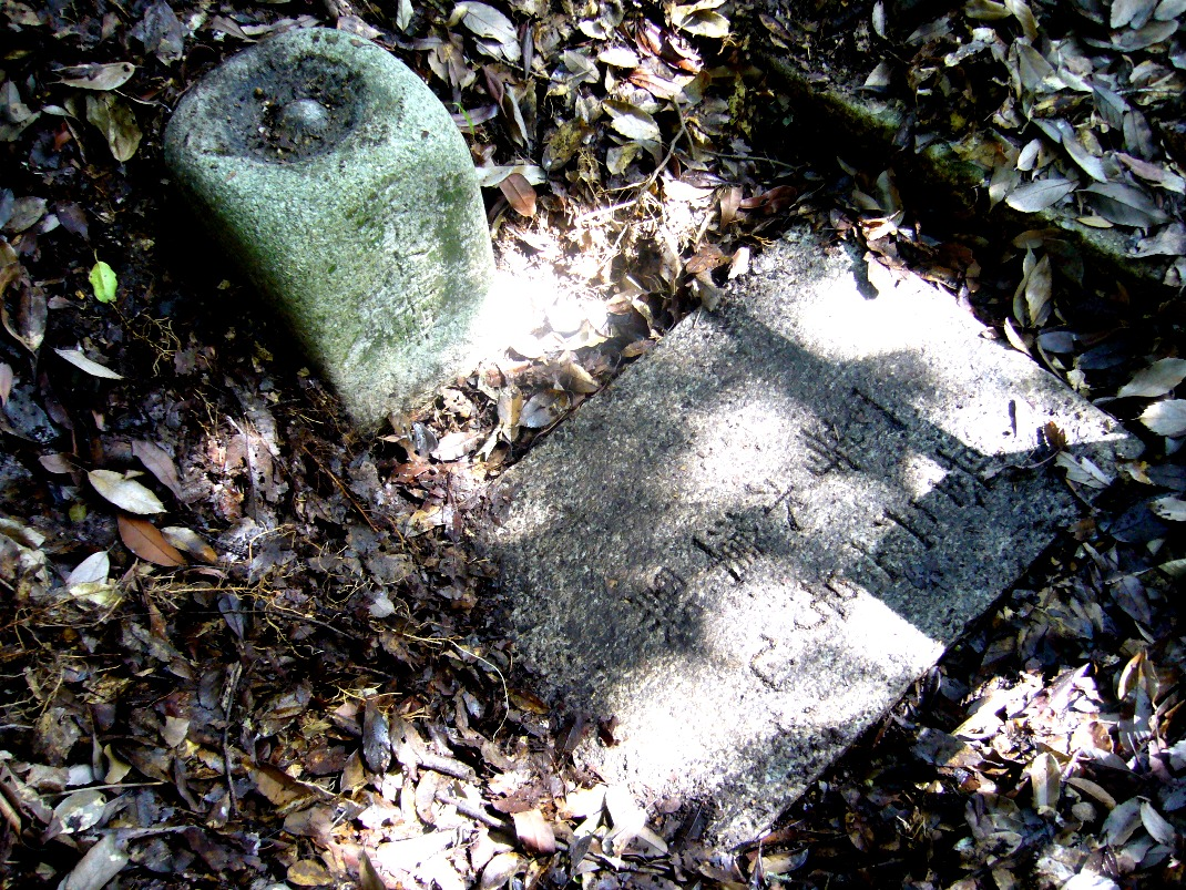 大阪府茨木市福井にある基準水準点・基二一号の拡大写真。2006年10月8日に投稿者が撮影。